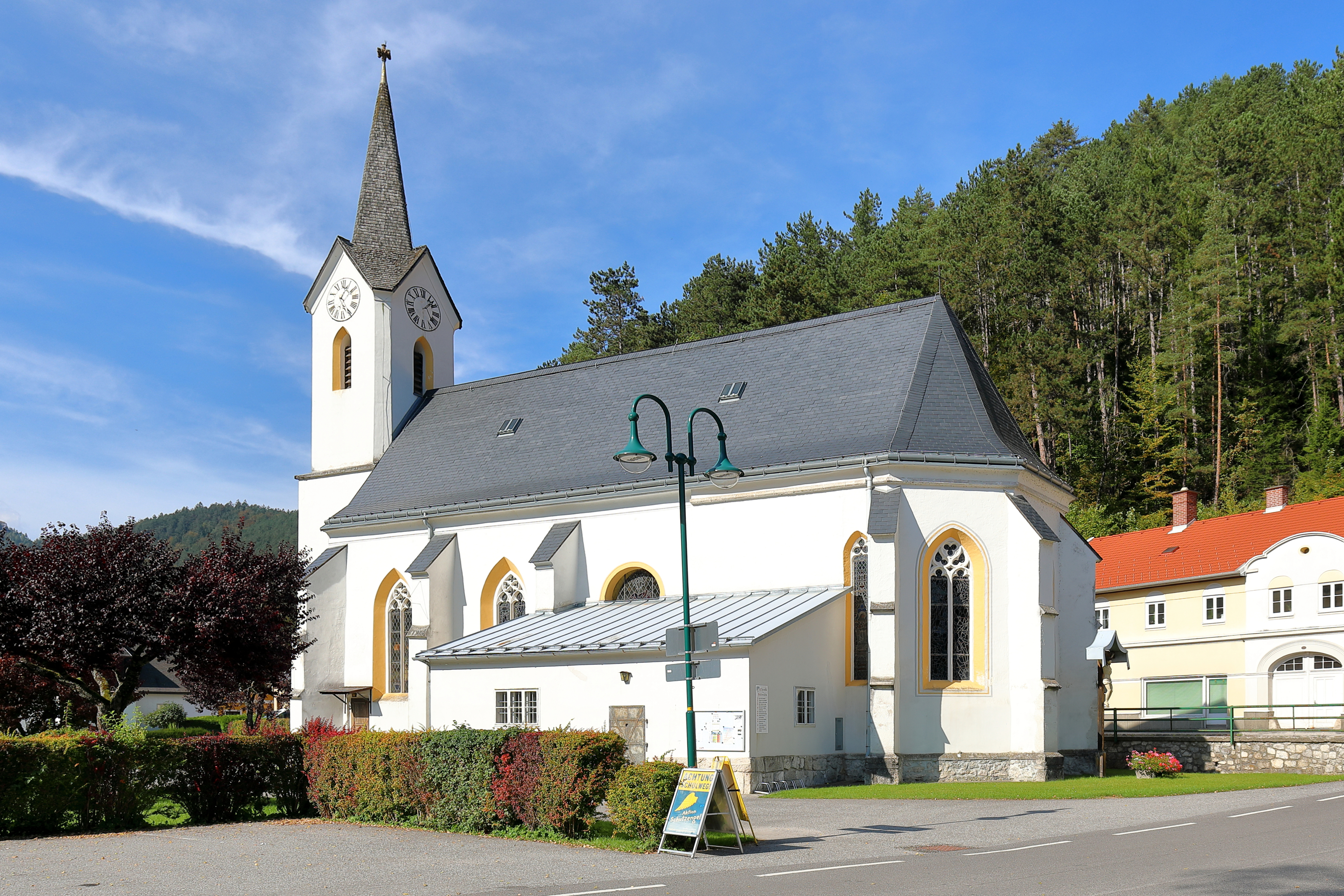 Südostansicht der röm.-kath. Pfarrkirche hl. Johannes der Täufer in der niederösterreichischen Marktgemeinde Gutenstein.Ursprünglich eine romanische Kirche, die mehrfach umgebaut und erweitert wurde. Im Jahr 1487 erfolgte der Zubau des gotischen Chores und von 1675 bis 1680 die Neuerrichtung des Langhauses. Im Jahr 1857 wurde der Turm erhöht, das Oratorium im Norden angebaut und die Grabkapelle errichtet. Die im Süden ehemals angebaute gotische Sakristei wurde 1907 abgetragen und durch eine neue ersetzt.